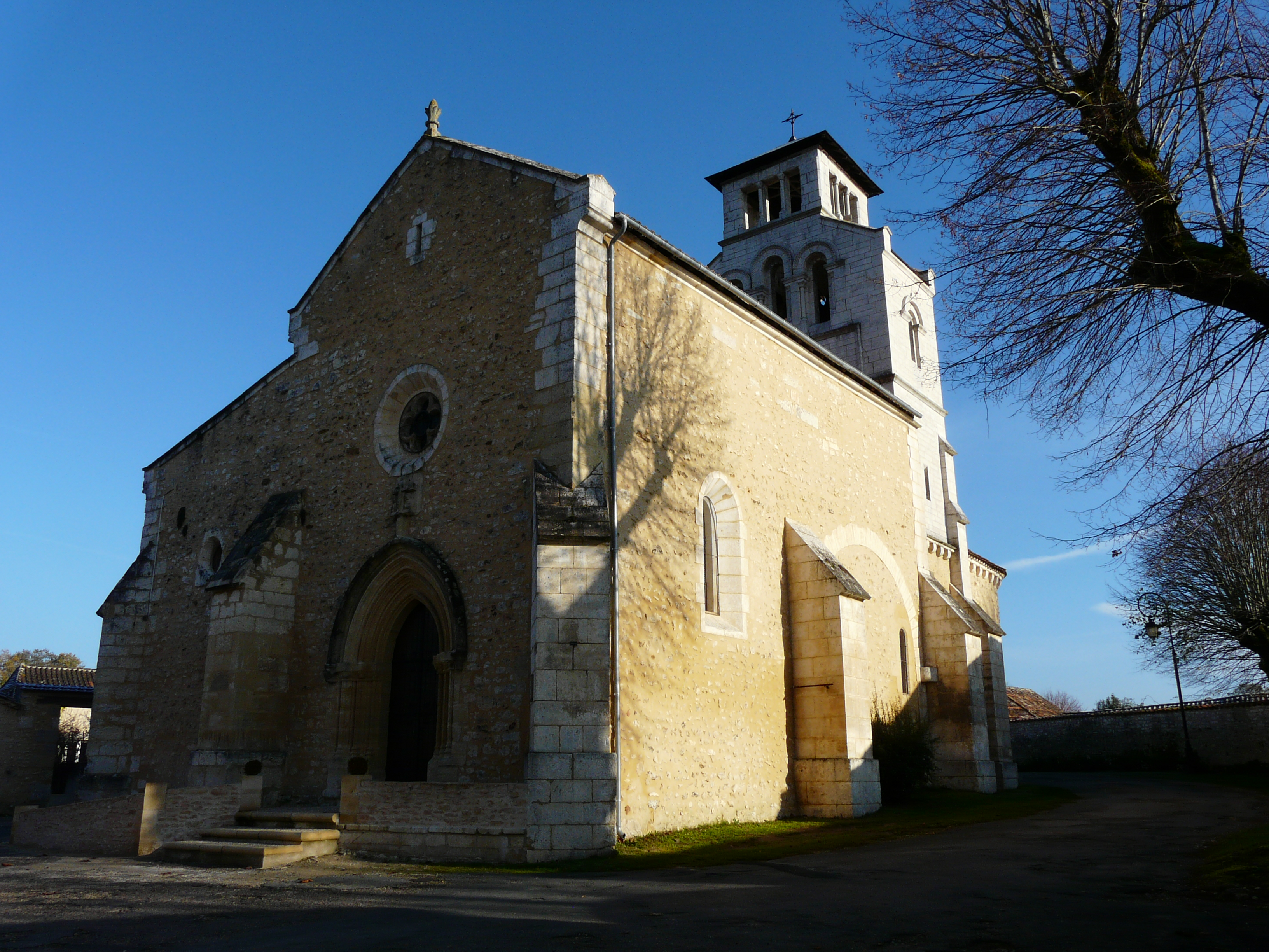 L'église Saint-Saturnin de Chalagnac vue du sud-ouest, Dordogne, France.